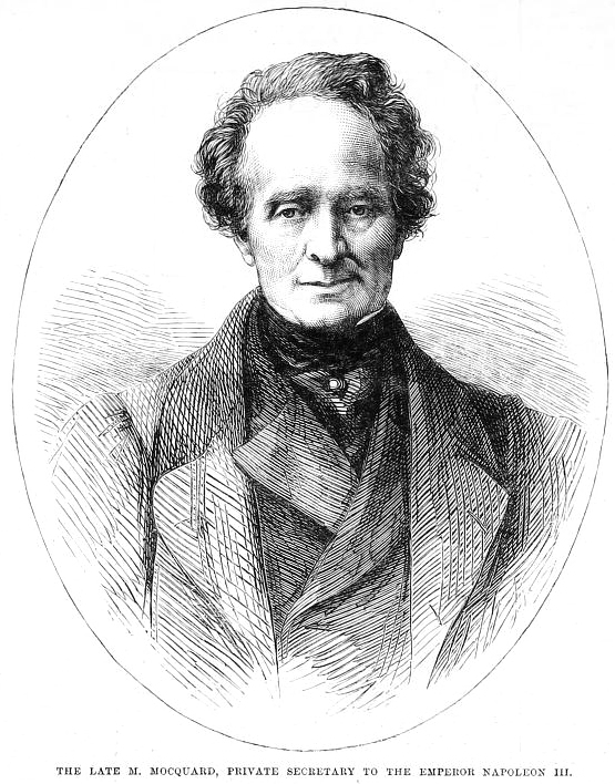 Jean-François Constant Mocquard (1791-1864)